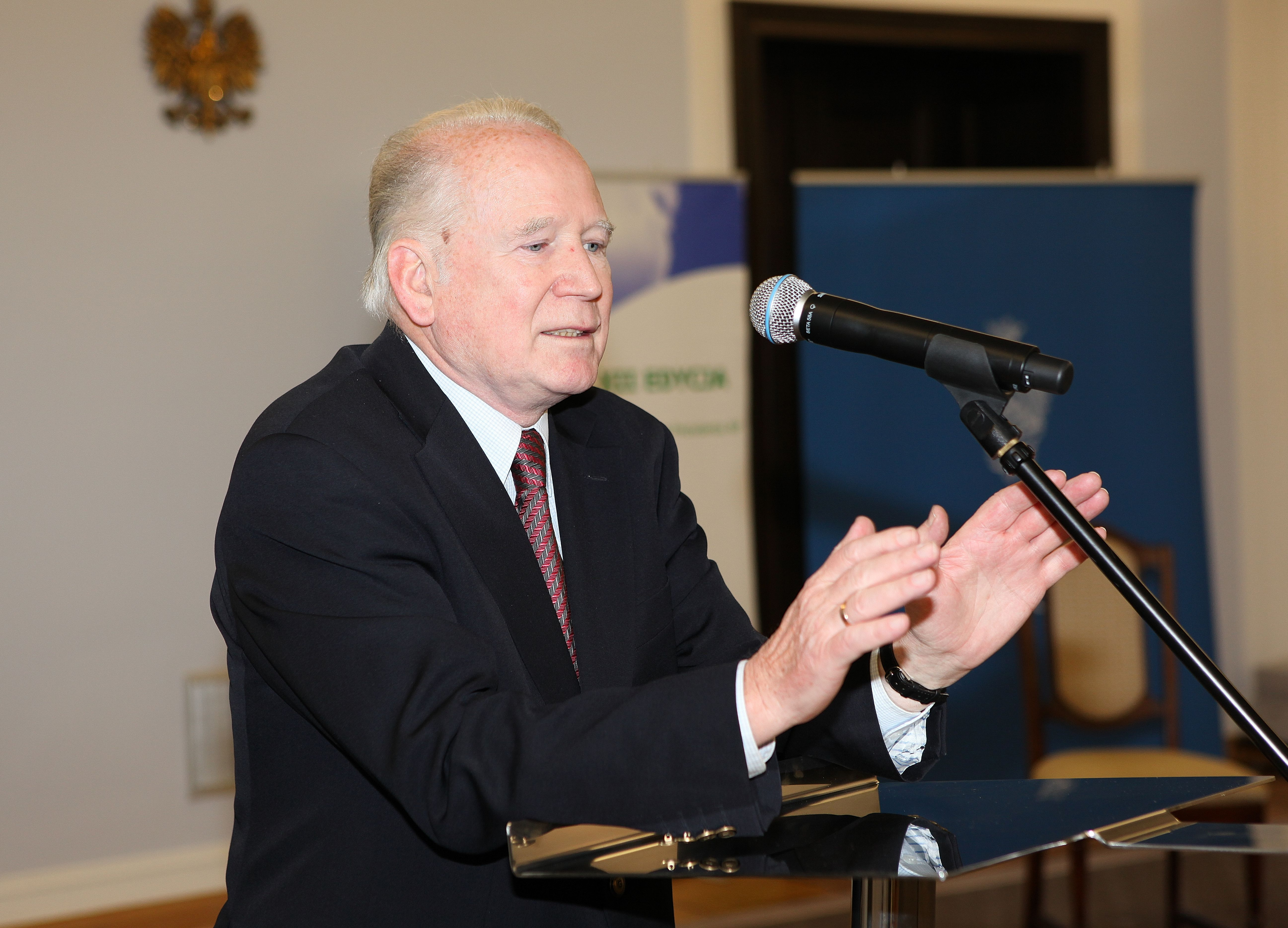 Profesor Maciej Nowicki. Gala Nominatów XII Edycji Narodowego Konkursu Ekologicznego "Przyjaźni Środowisku" w Senacie RP